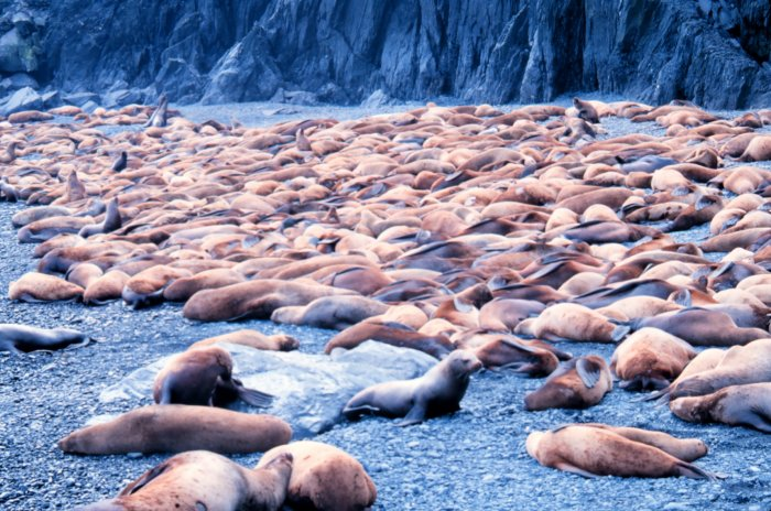 Kolonie des Stellerschen Seelöwen (Steller sea lion - Eumetopias jubatus. Alaska, Middleton Island, Gulf of Alaska.) * first upload: March 20, 2004 - Wikipedia by User:Baldhur